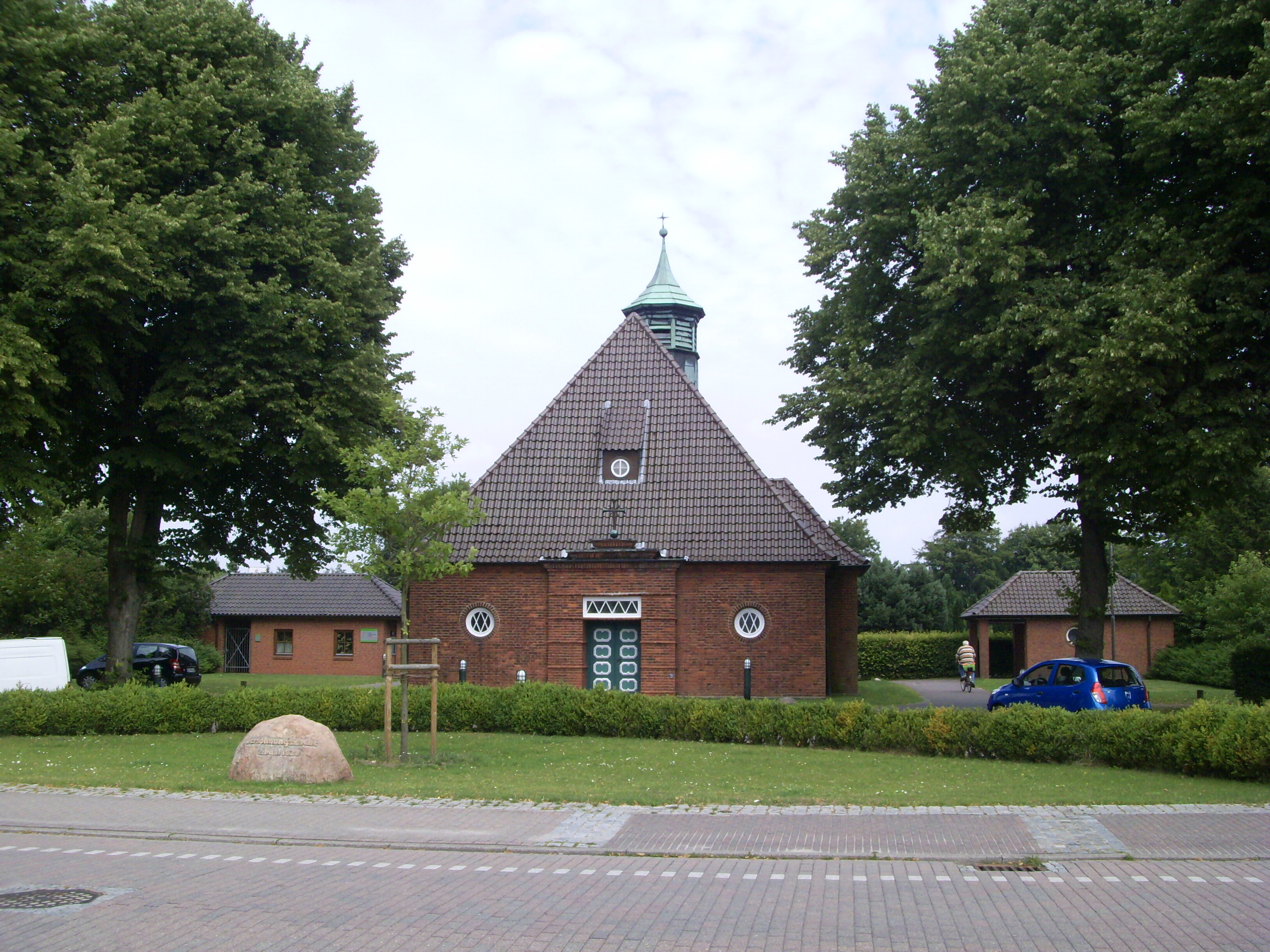 Die evangelische Versöhnungskirche in Harrislee, erbaut 1927-1928, seit 1987 unter Denkmalschutz